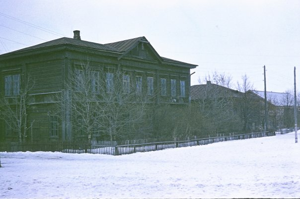 Школа в селе Челпаново, Атяшевский район, Республика Мордовия